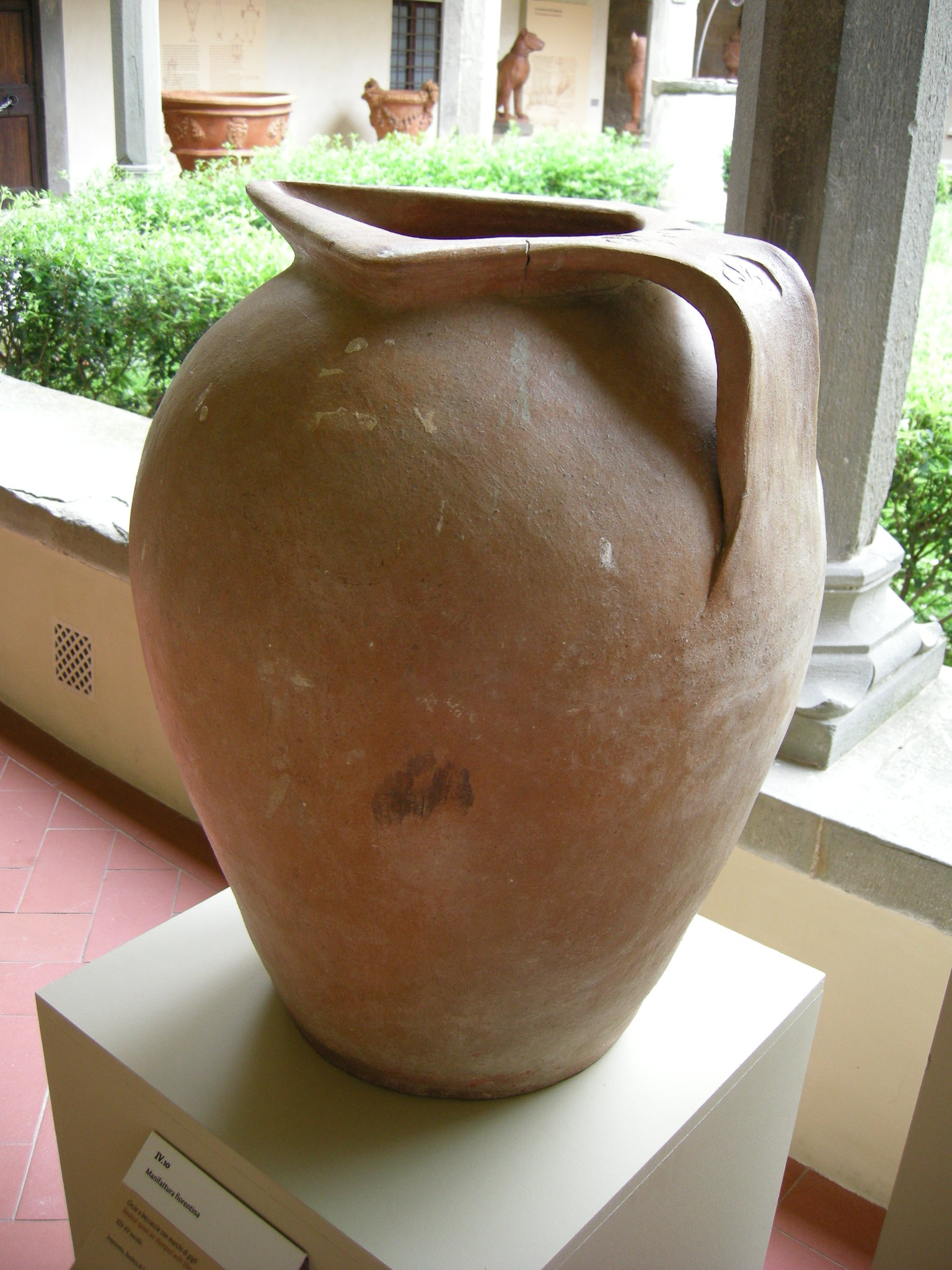 Impunteta, orcio